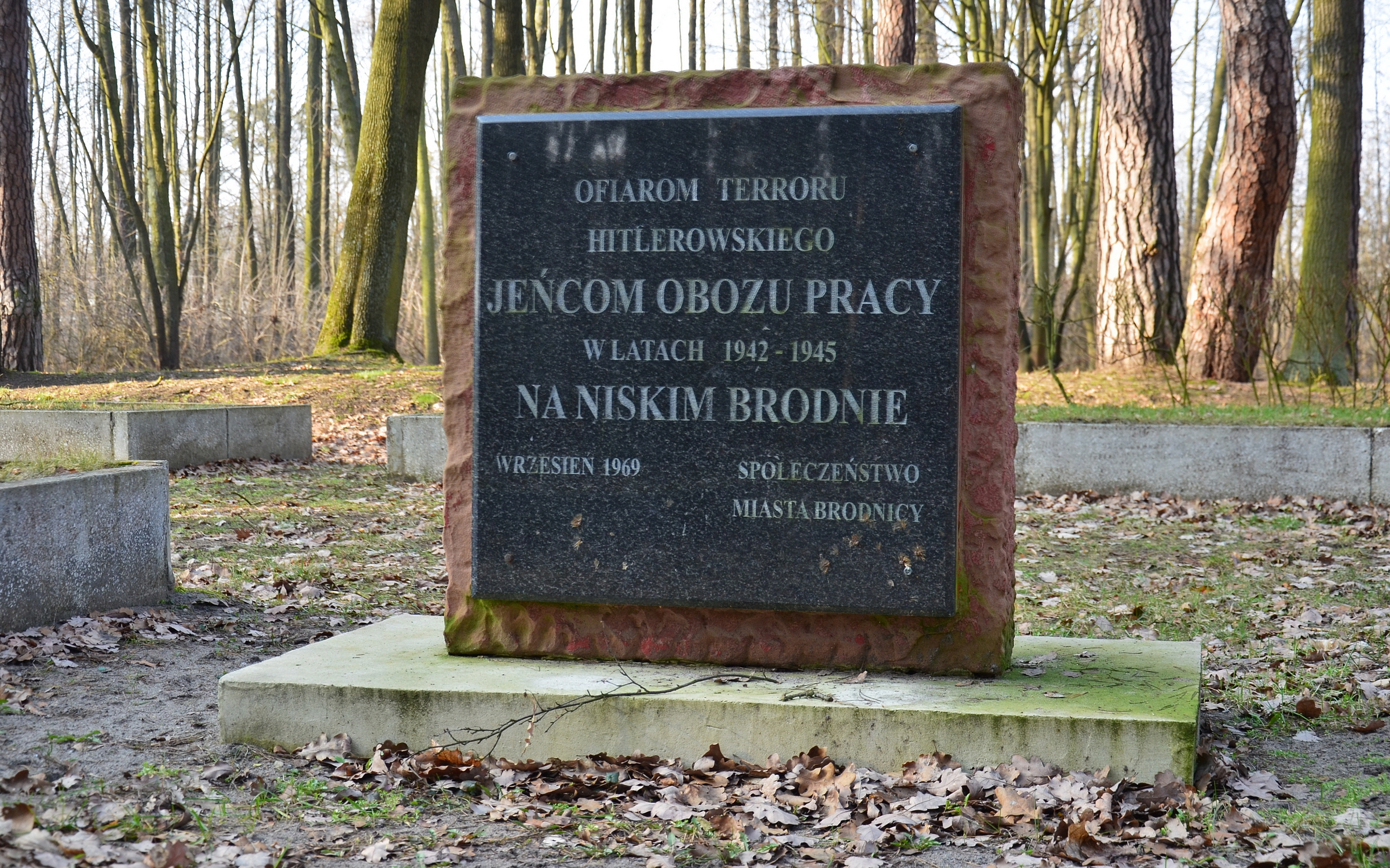 Cmentarz wojskowy w Brodnicy